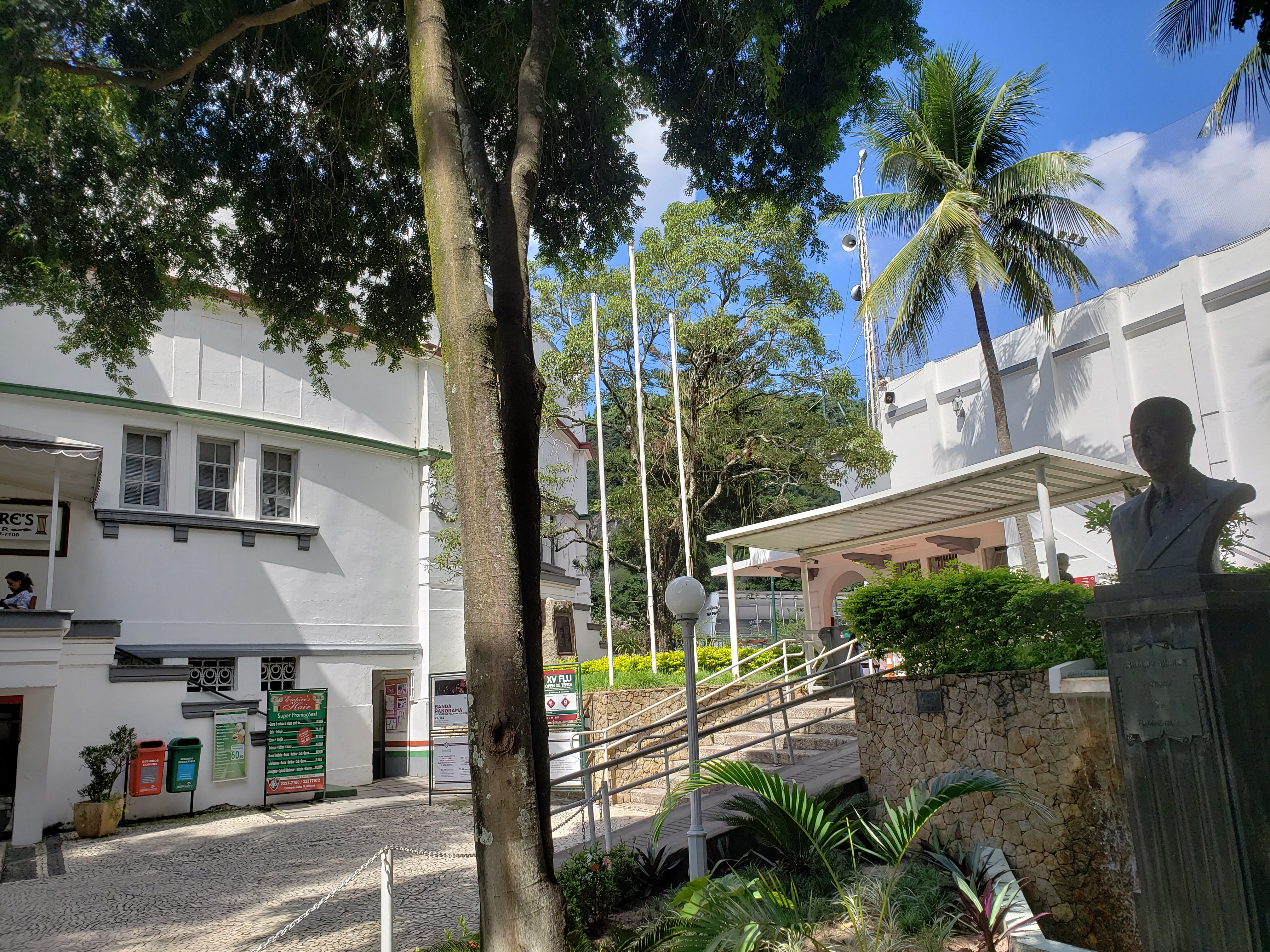 Queda d'água, busto de Arnaldo Guinle e vista parcial do Fluminense Football Club.